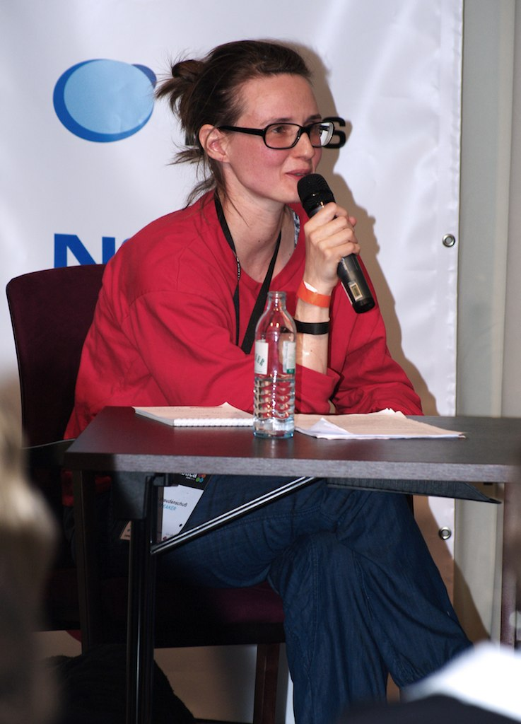 Svenja Schröder, Helga Christina Hansen, Rochus Wolff, Chris Köver, Ina Freudenschuß „Feministische Netzkultur 2.0“, Kalkscheune Grosser Saal